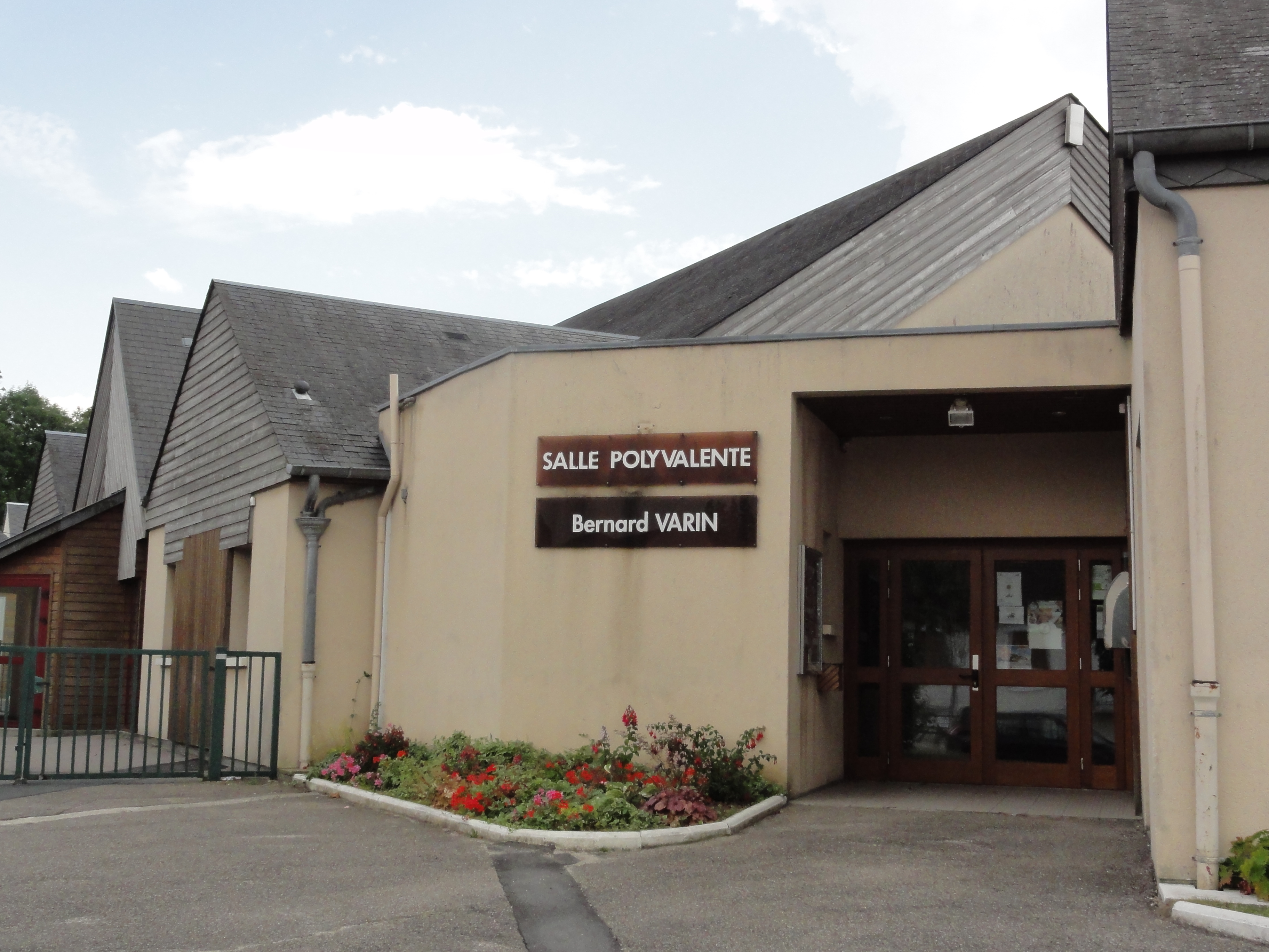 La Trinité-du-Mont (Seine-Mar.) salle polyvalente